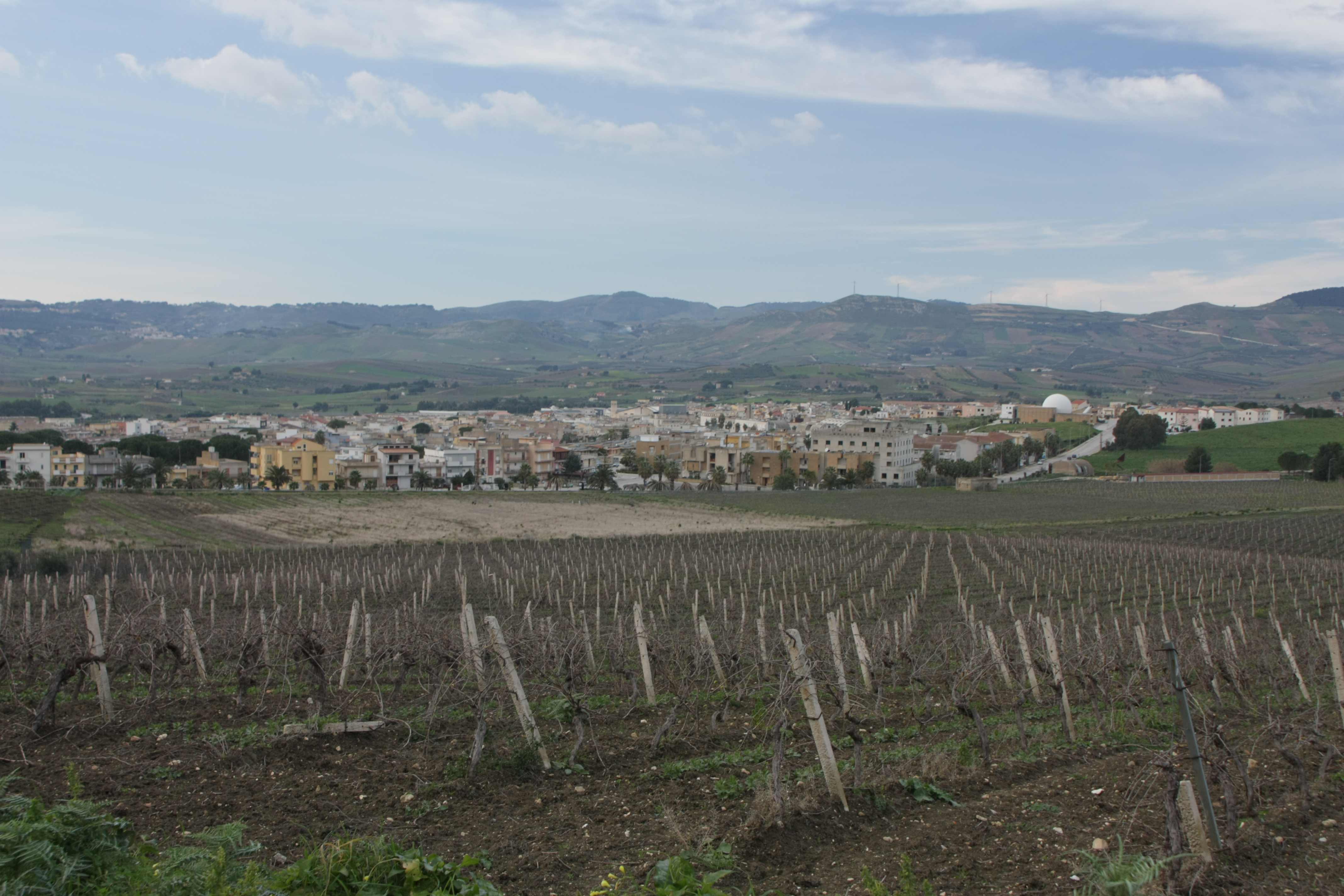 Panorama di Gibellina Nuova dal Baglio Di Stefano